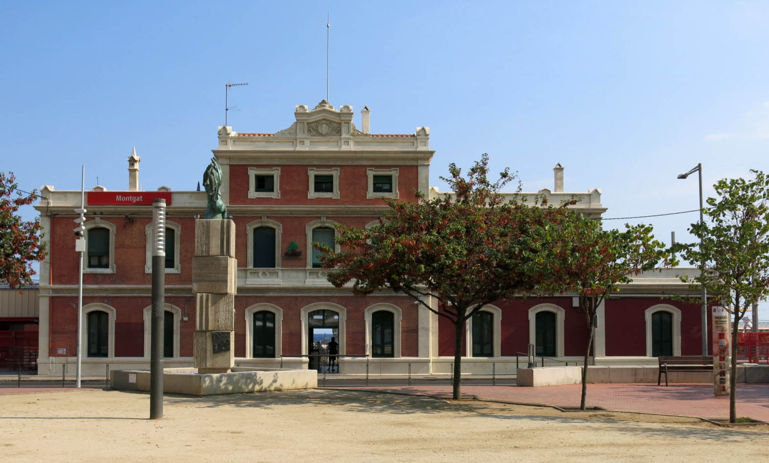 Estació de Montgat Object location41° 27′ 46.76″ N, 2° 16′ 19.28″ E